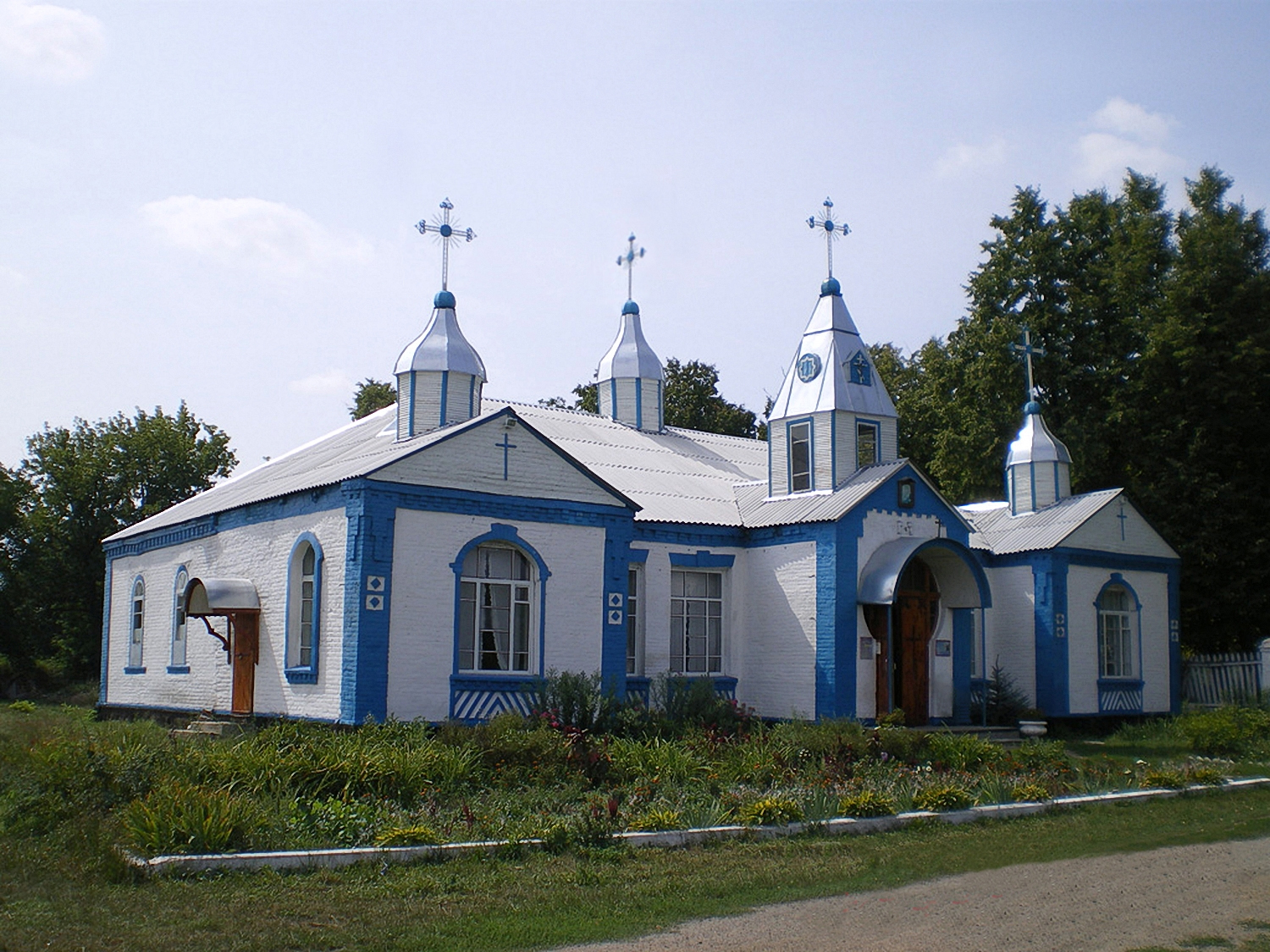 Православна церква: фото